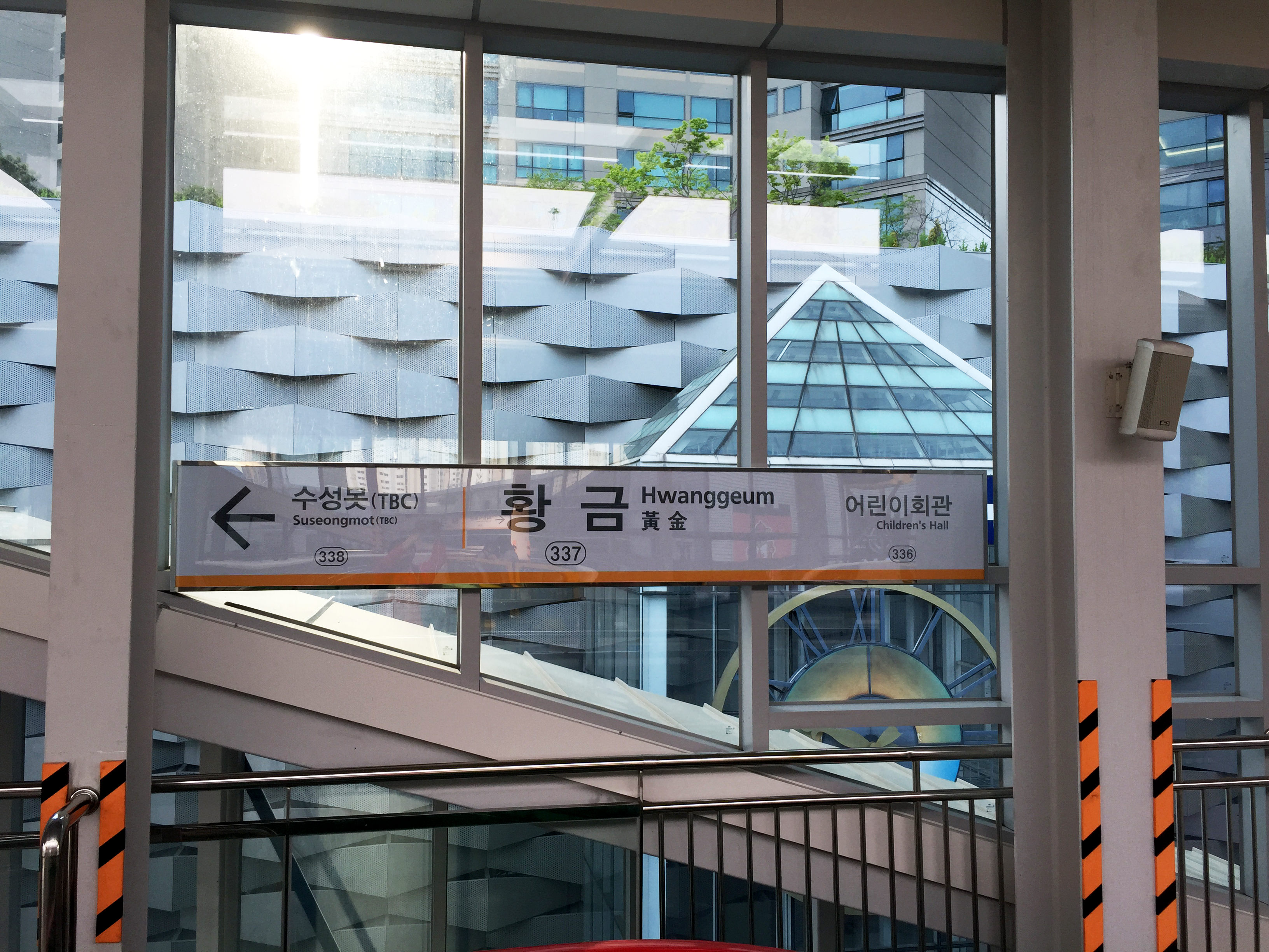 황금역 역명판